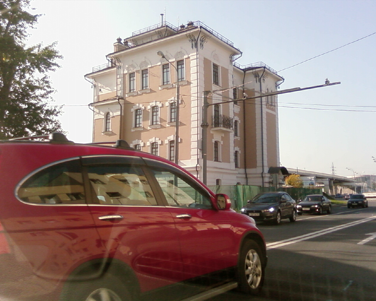 Здание вокзала остановочного пункта «Потылиха» Малого кольца Московской железной дороги. Вид со стороны одноимённой улицы.